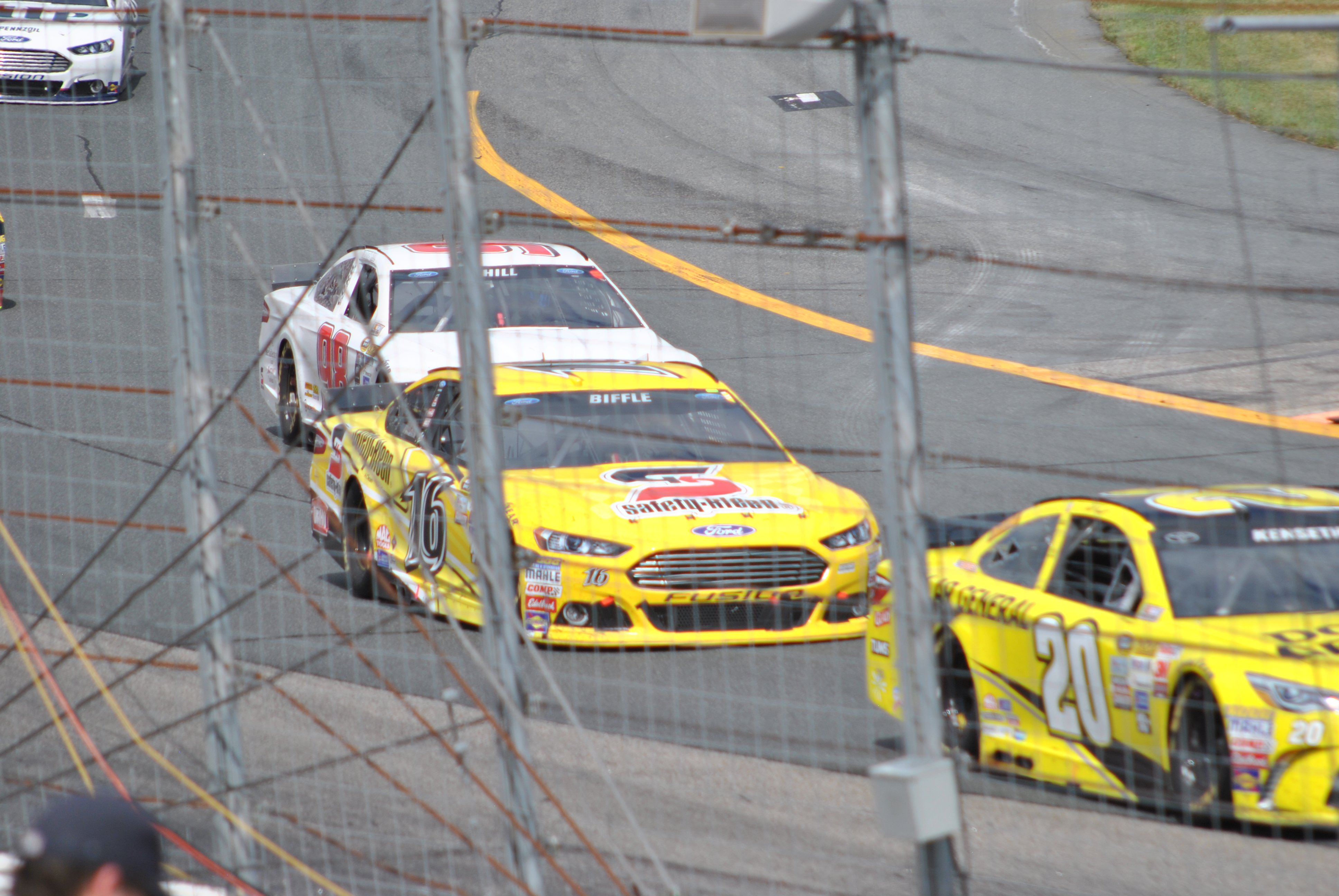 Greg Biffle